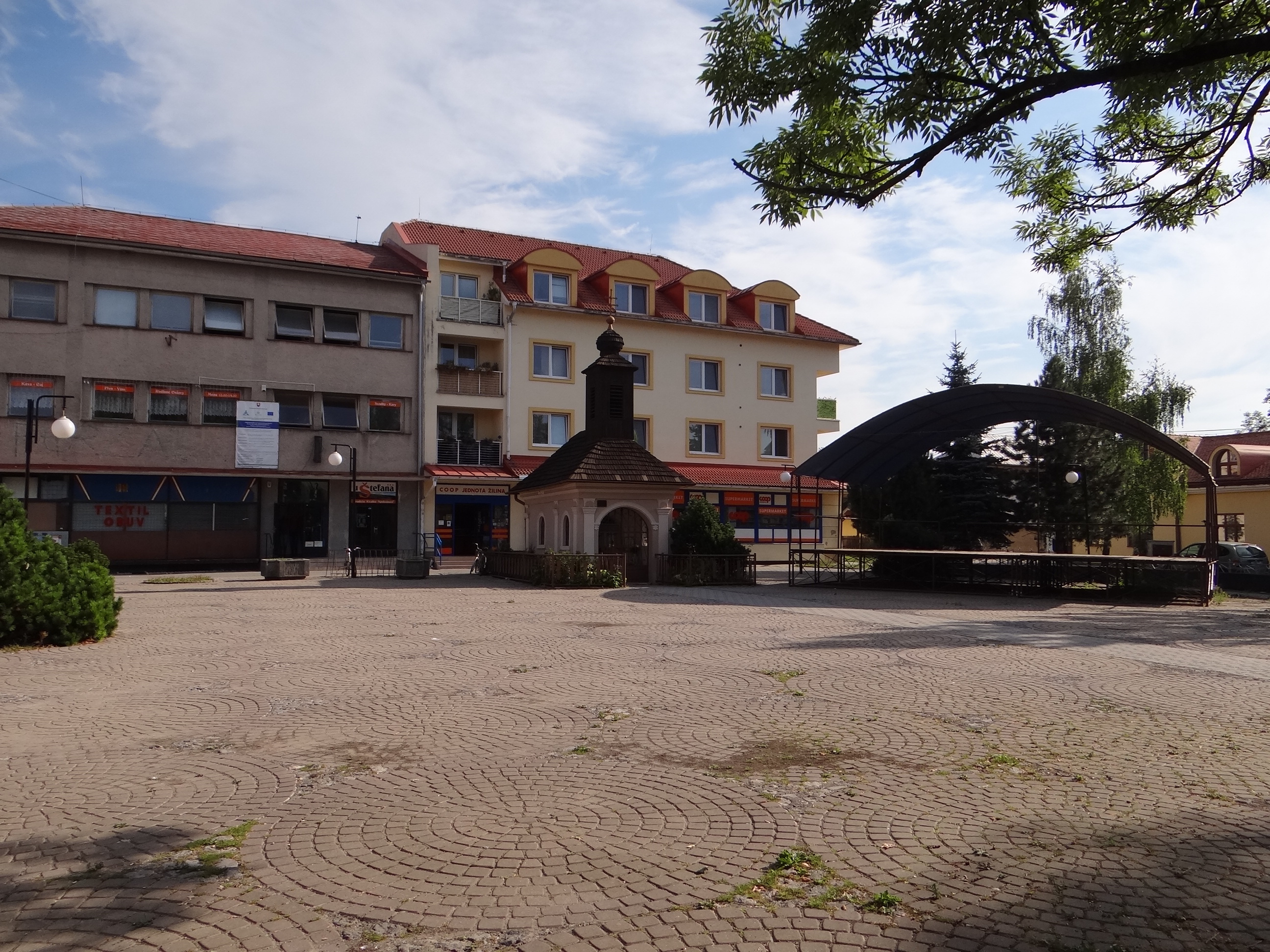 Varín